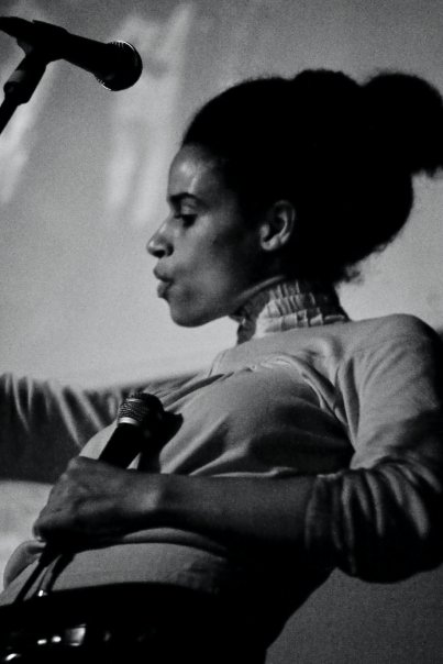 Joy Frempong von Filewile, Kapstadt, 2009